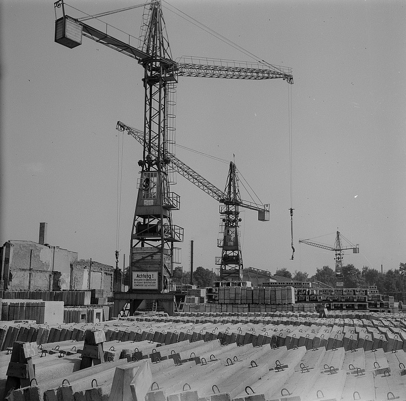 Original image description from the Deutsche Fotothek Turmdrehkrane in einem Betonwerk (vermutlich Gerokstraße)